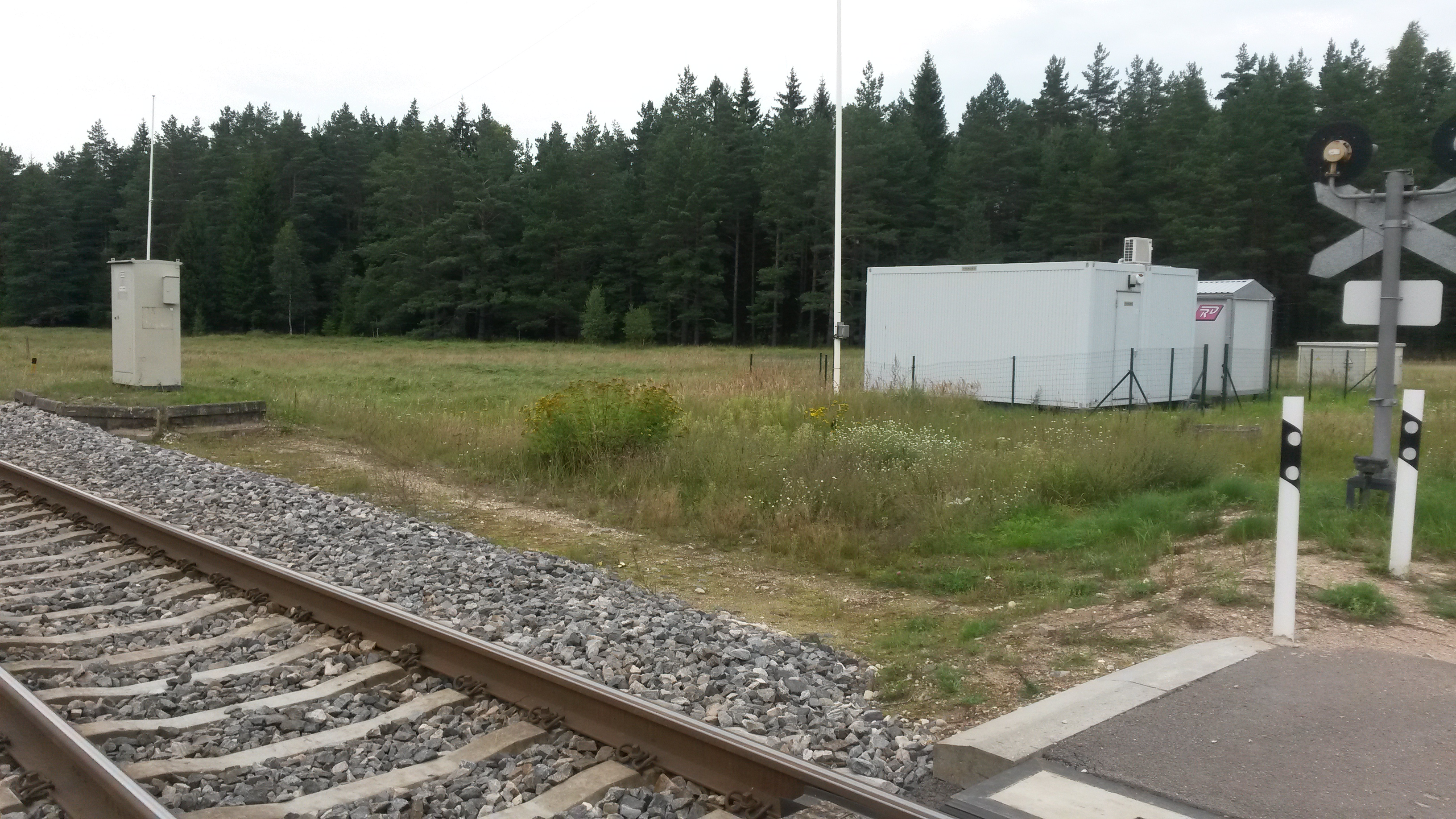 Puzes pieturas punkts.